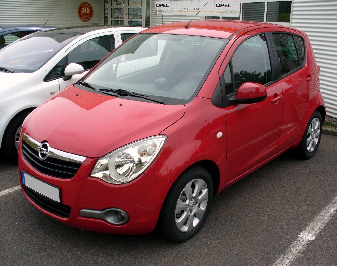 Opel Agila B